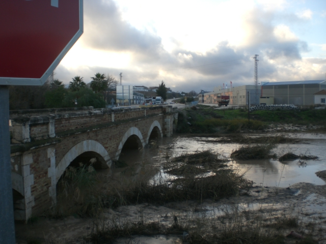 Foto del río Corbones en una crecida en el año 2009 a su paso por la Puebla de Cazalla